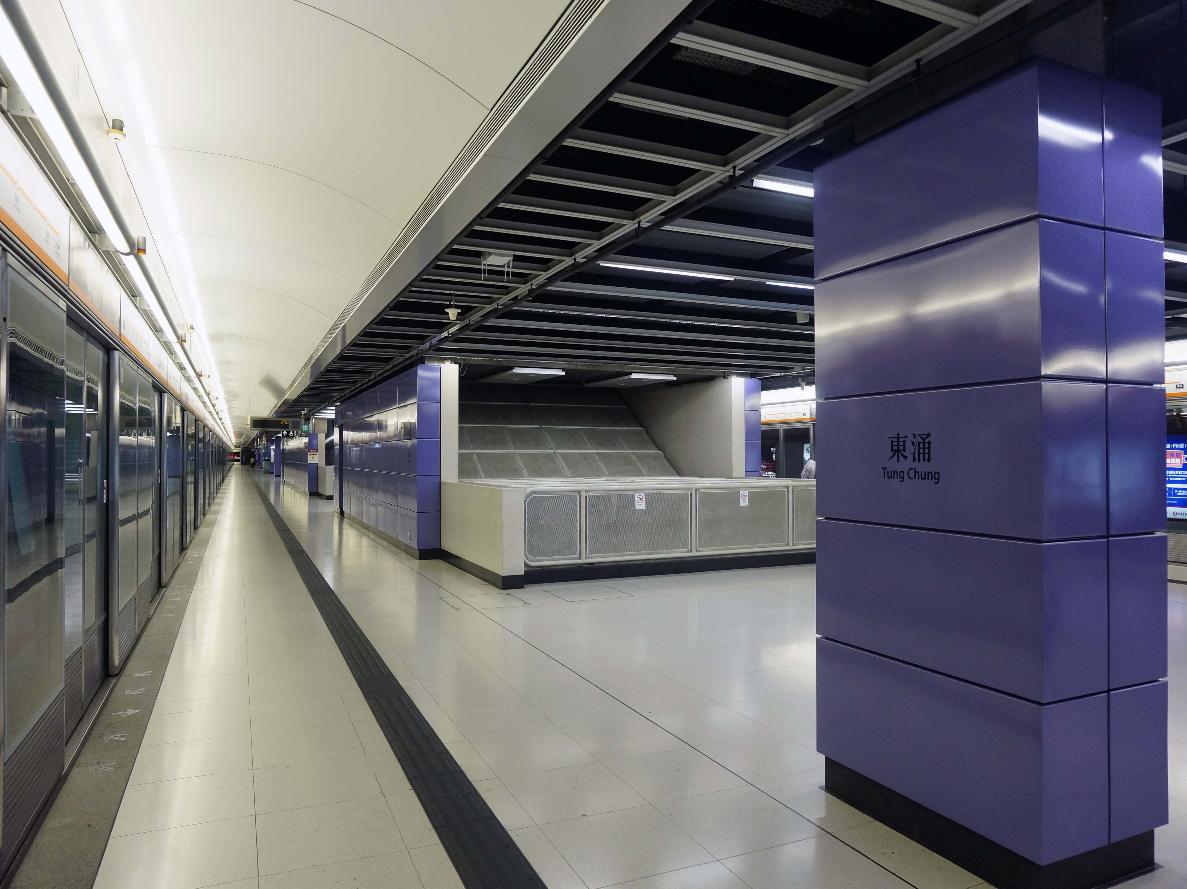 港鐵東涌站月台